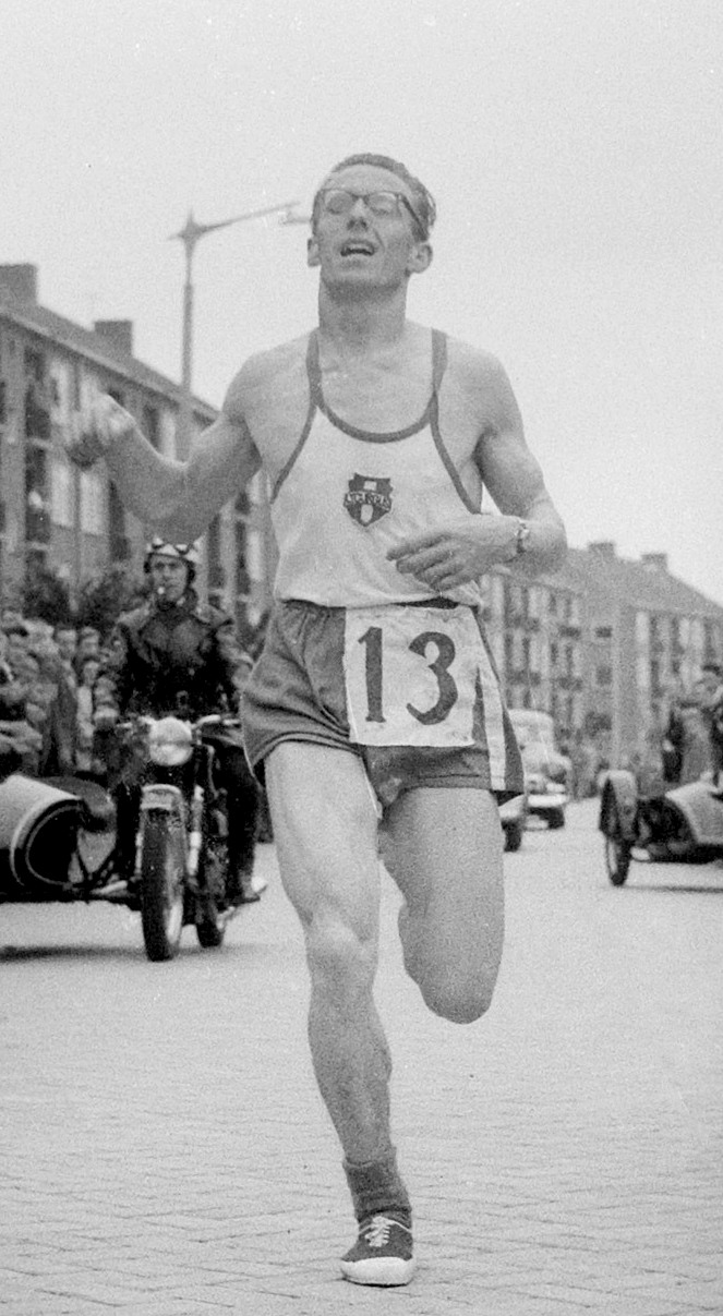 Nationale marathonkampioenschap in Zaandam, Piet Bleeker passeert de finish